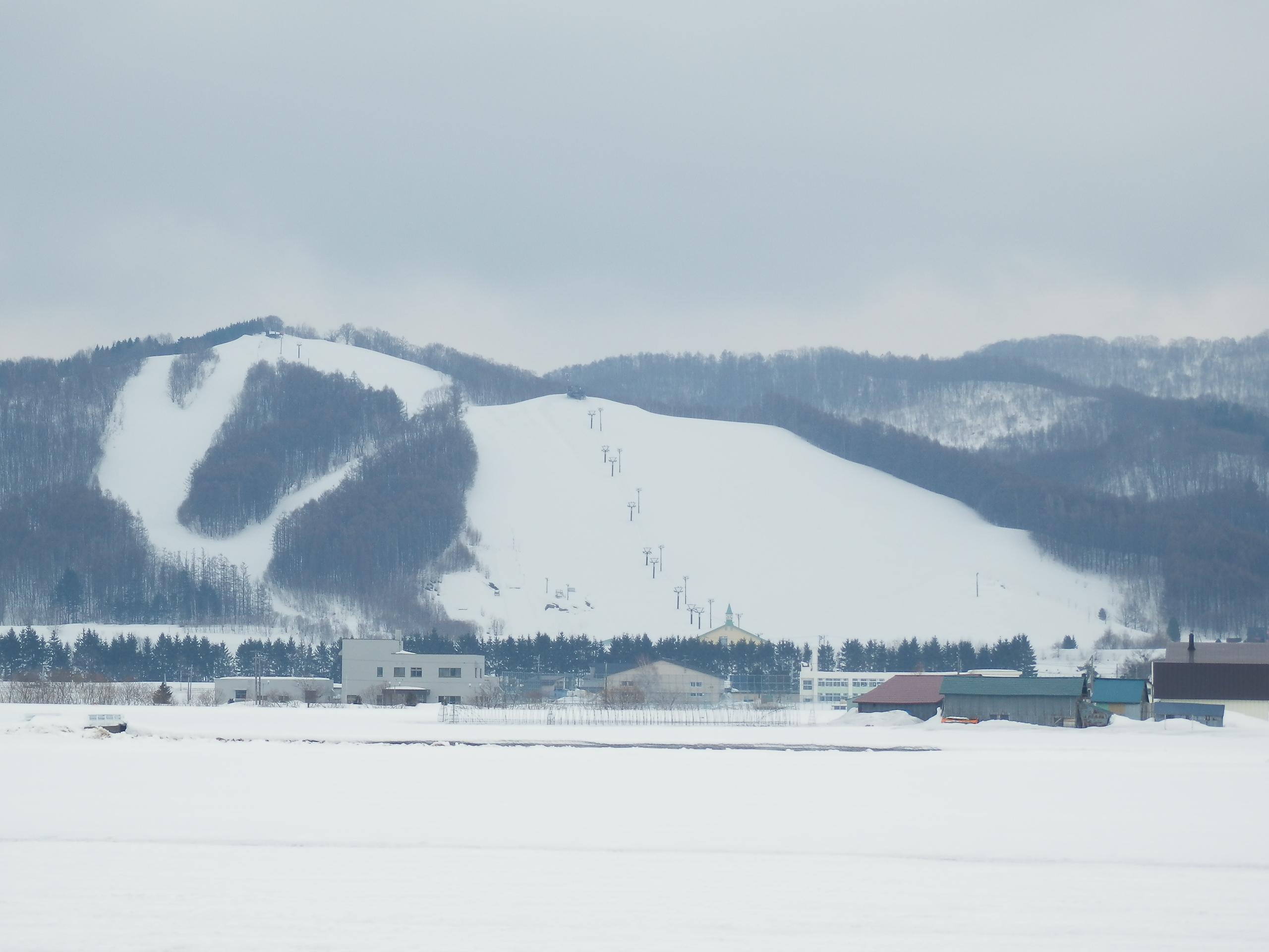 和寒東山スキー場全景